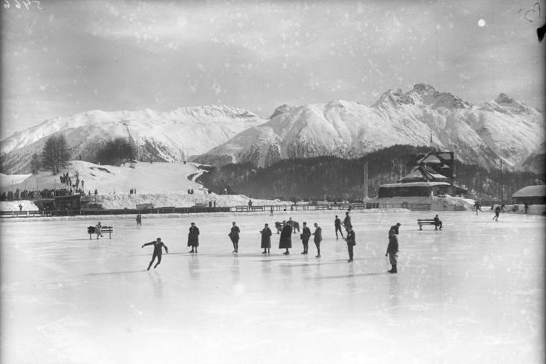 Die große Winter-Olympiade in St. Moritz! Neueste Aufnahmen von unserem nach St. Moritz entsandten Sonder-Bild-Berichterstatter. Nach kurzer Pause wurde als Erstes das Eiskunstlaufen für Herren fortgesetzt. Der deutsche Meister Rittberger ebenfalls beim Pflichtlaufen vor der Jury.